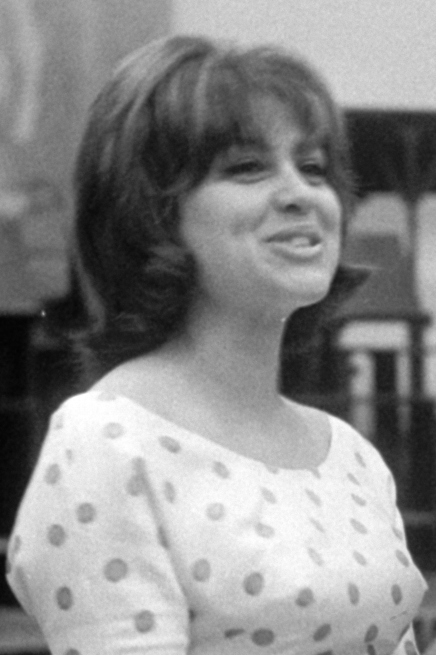 Domján Edit magyar színésznő.